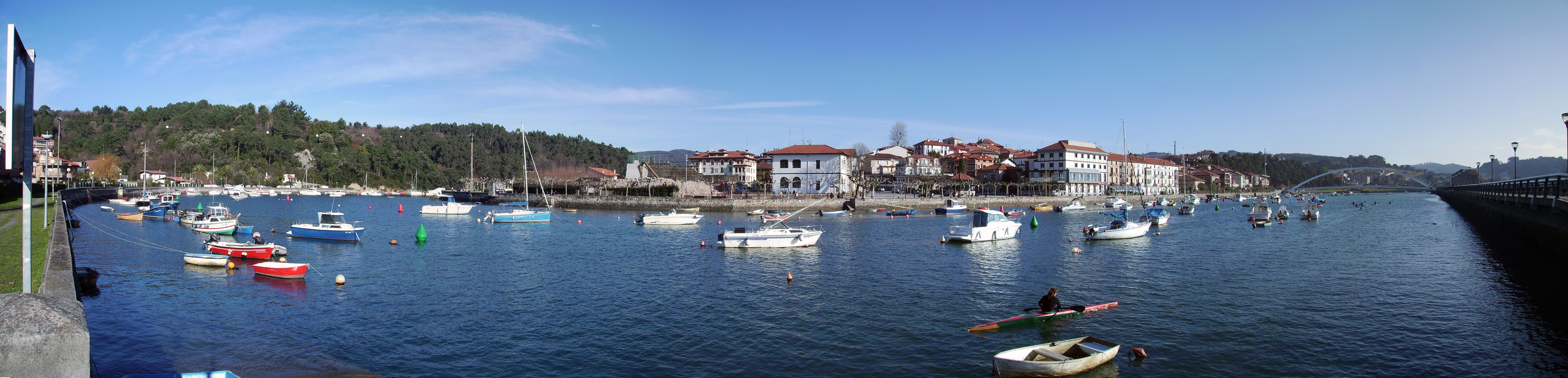 Plentziako itsasadarraren argazki panoramiko bat